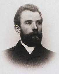 Søren Larsen Meldgaard, 07.Sep.1850-27.Aug.1894